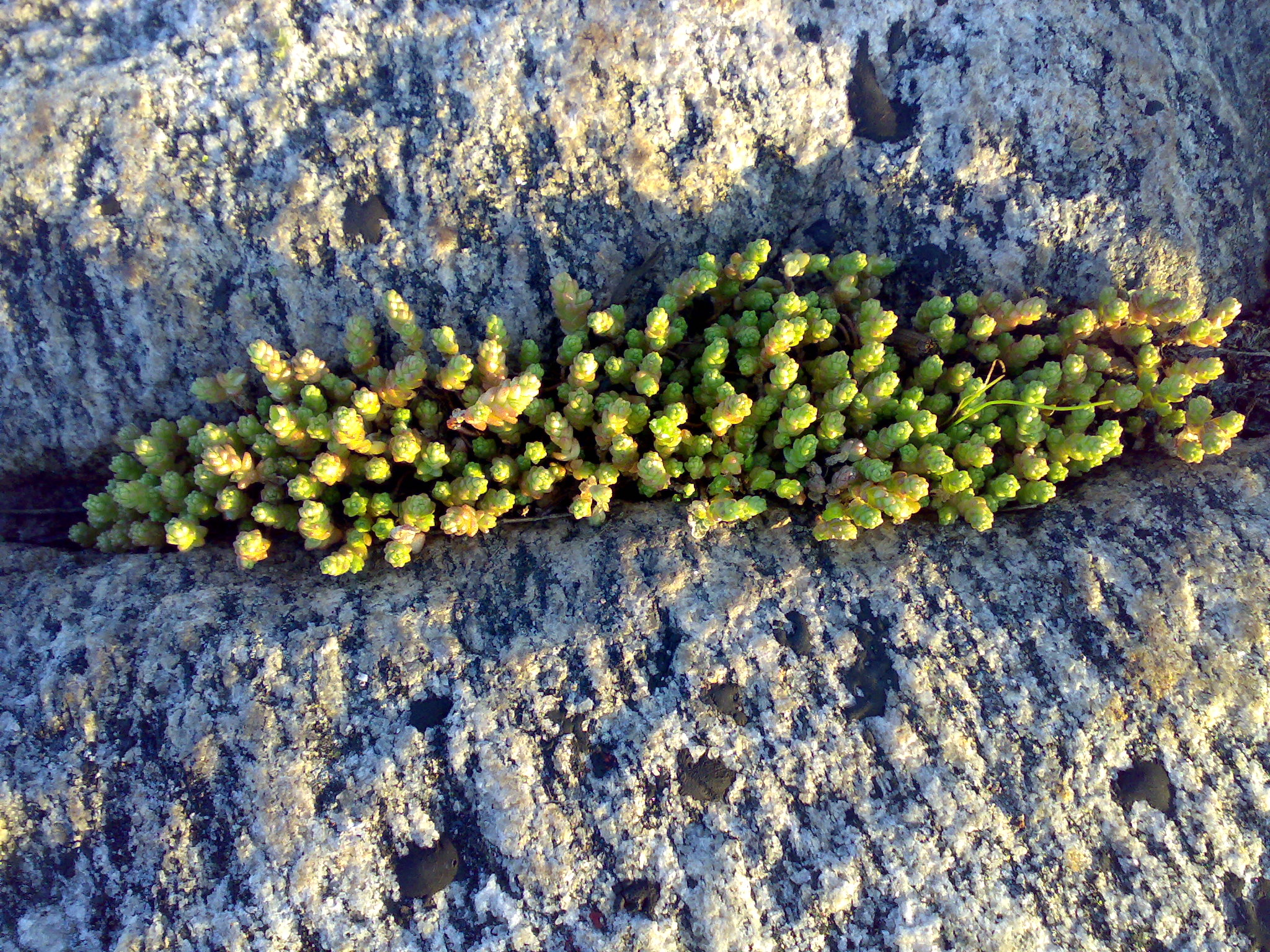 Sedum acre, Bitterbergknapp, Blekinge, Sweden